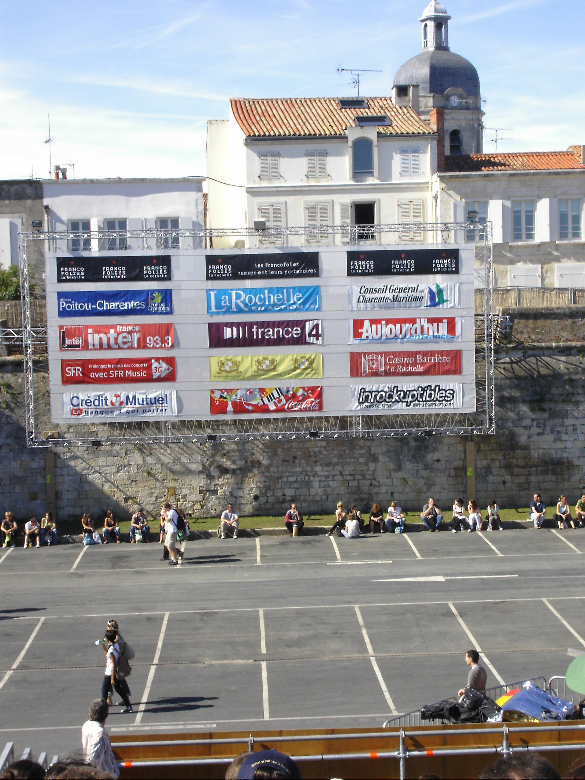 Sponsoring aux Francofolies